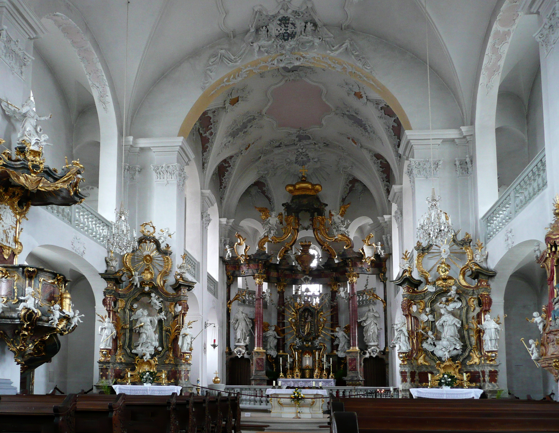 Kirche Maria Limbach, Balthasar Neumann 1751-1755, Innenansicht, Hochaltar von Johann Peter Wagner 1761This is a photograph of an architectural monument.